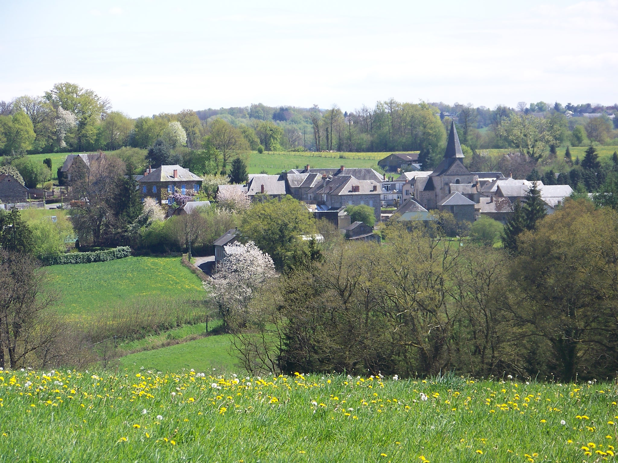 Vue d'ensemble du village de Condat sur Ganaveix (19)